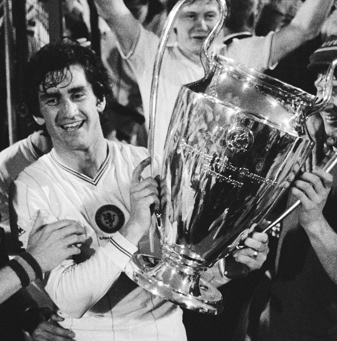 Collectie / Archief : Fotocollectie Anefo Reportage / Serie : [ onbekend ] Beschrijving : FC Bayern Munchen tegen Aston Villa 0-1 Europa Cup I blijde Aston Villa spelers met de Cup Datum : 26 mei 1982 Trefwoorden : sport, voetbal Persoonsnaam : Aston Villa, CUP, FC Bayern Munchen Fotograaf : Antonisse, Marcel / Anefo Auteursrechthebbende : Nationaal Archief Materiaalsoort : Negatief (zwart/wit) Nummer archiefinventaris : bekijk toegang 2.24.01.05 Bestanddeelnummer : 932-1812